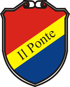 Stemma della contrada "Il Ponte" del Palio dei Micci di Querceta.